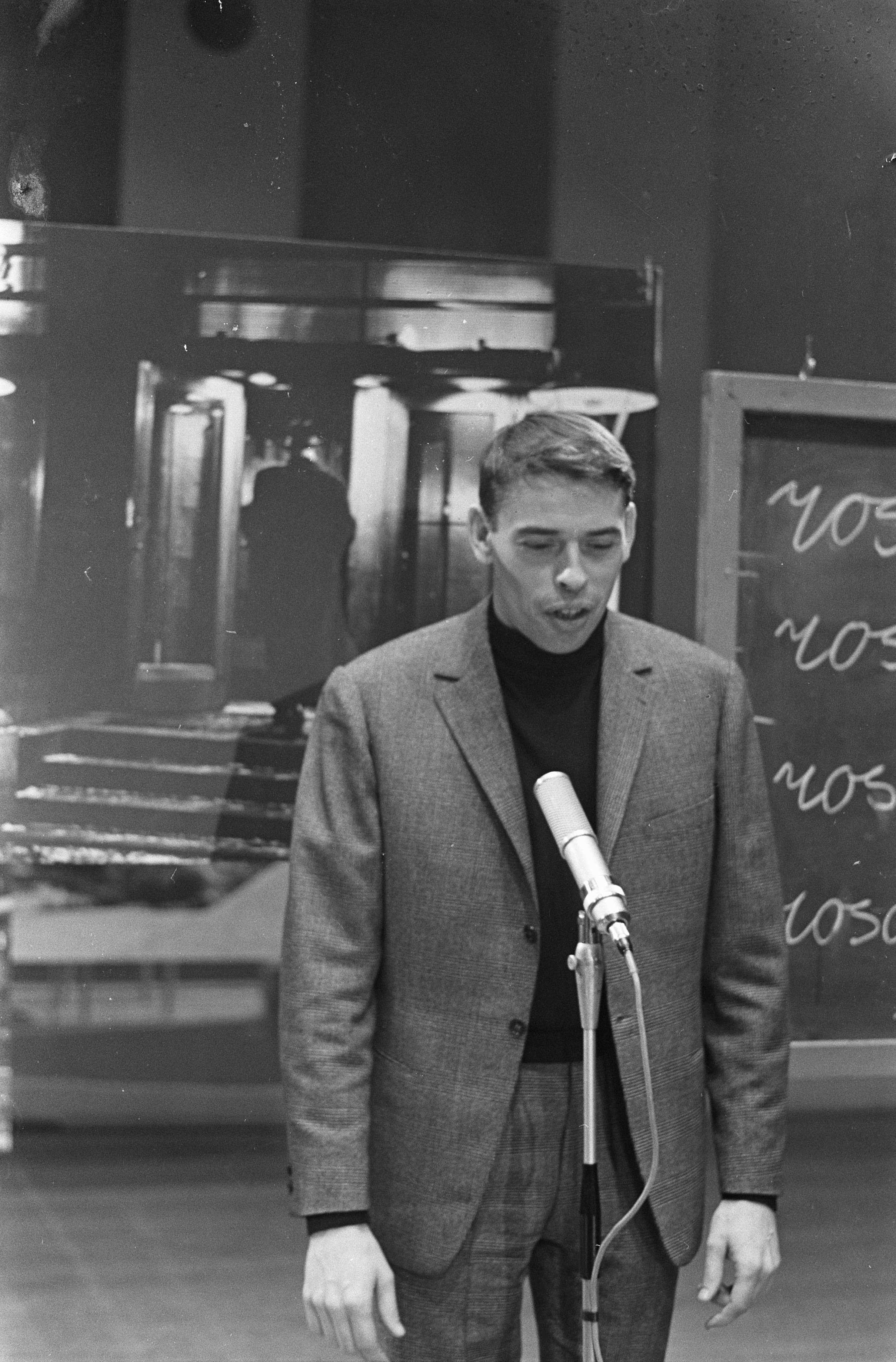 Collectie / Archief : Fotocollectie Anefo Reportage / Serie : [ onbekend ] Beschrijving : TV-uitzending "Domino" Jacques Brel tijdens de opname in Amsterdam, Marcanti Datum : 20 februari 1963 Locatie : Amsterdam, Noord-Holland Trefwoorden : TV-programma's, zangers Persoonsnaam : Brel, Jacques Fotograaf : Bilsen, Joop van / Anefo Auteursrechthebbende : Nationaal Archief Materiaalsoort : Negatief (zwart/wit) Nummer archiefinventaris : bekijk toegang 2.24.01.05 Bestanddeelnummer : 914-8402